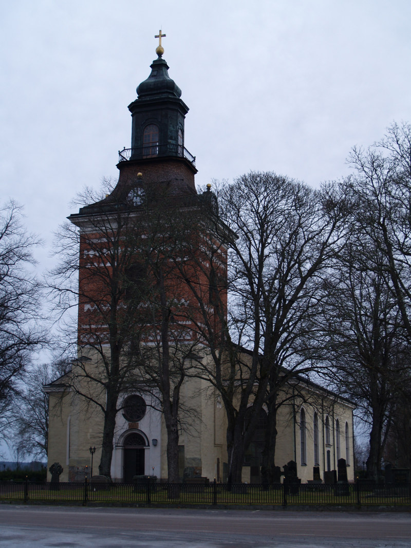 Church of Folkärna, Sweden. Folkärna kyrka, i Dalarna, utanför Avesta/Krylbo. I Folkärna församling.